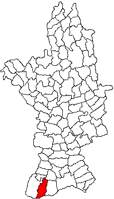 Categorie:Hărţi ale judeţului Olt